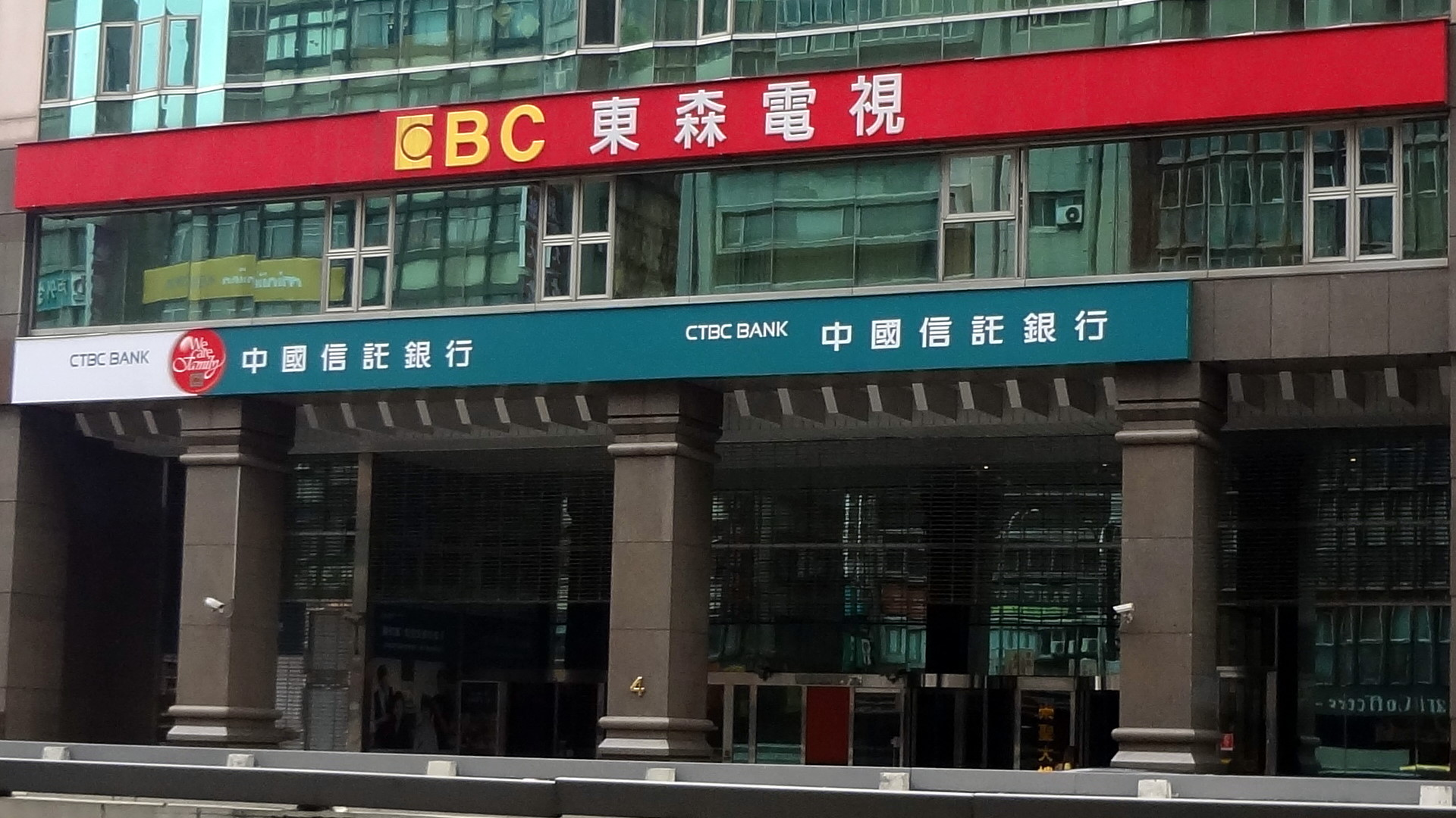 中文（台灣）: 崇聖大樓是東森電視總部、中國信託商業銀行站前分行的共同所在地。